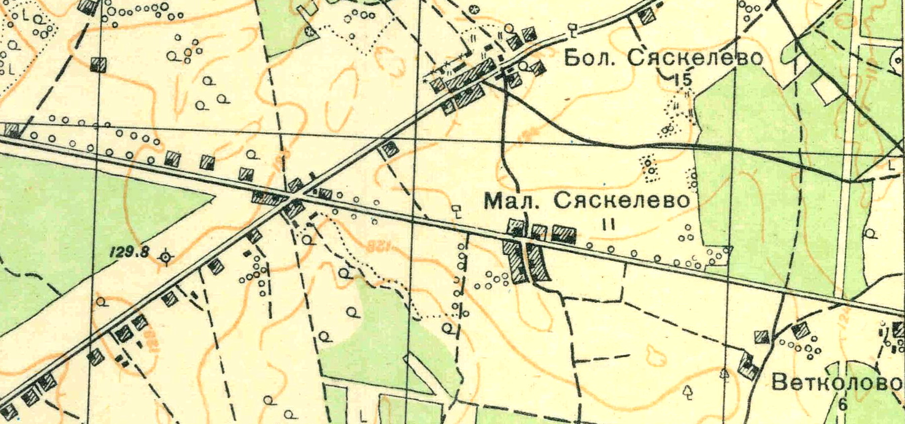 Топографическая карта Ленинградской области, квадрат О-35-24-Б-в (Вохоново), деревня Сяськелево